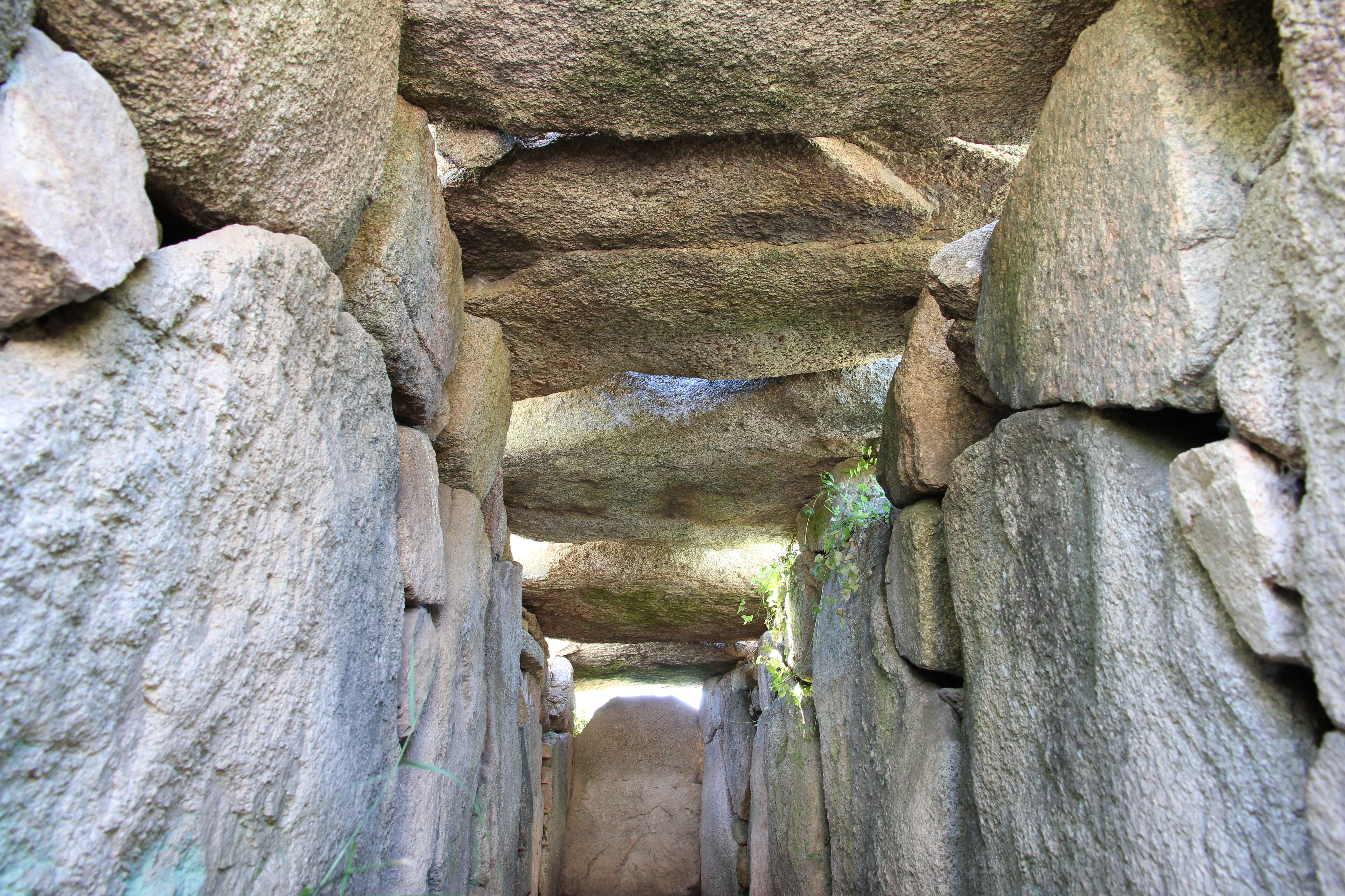 Dorgali - Tomba dei giganti di S'Ena 'e Thomes